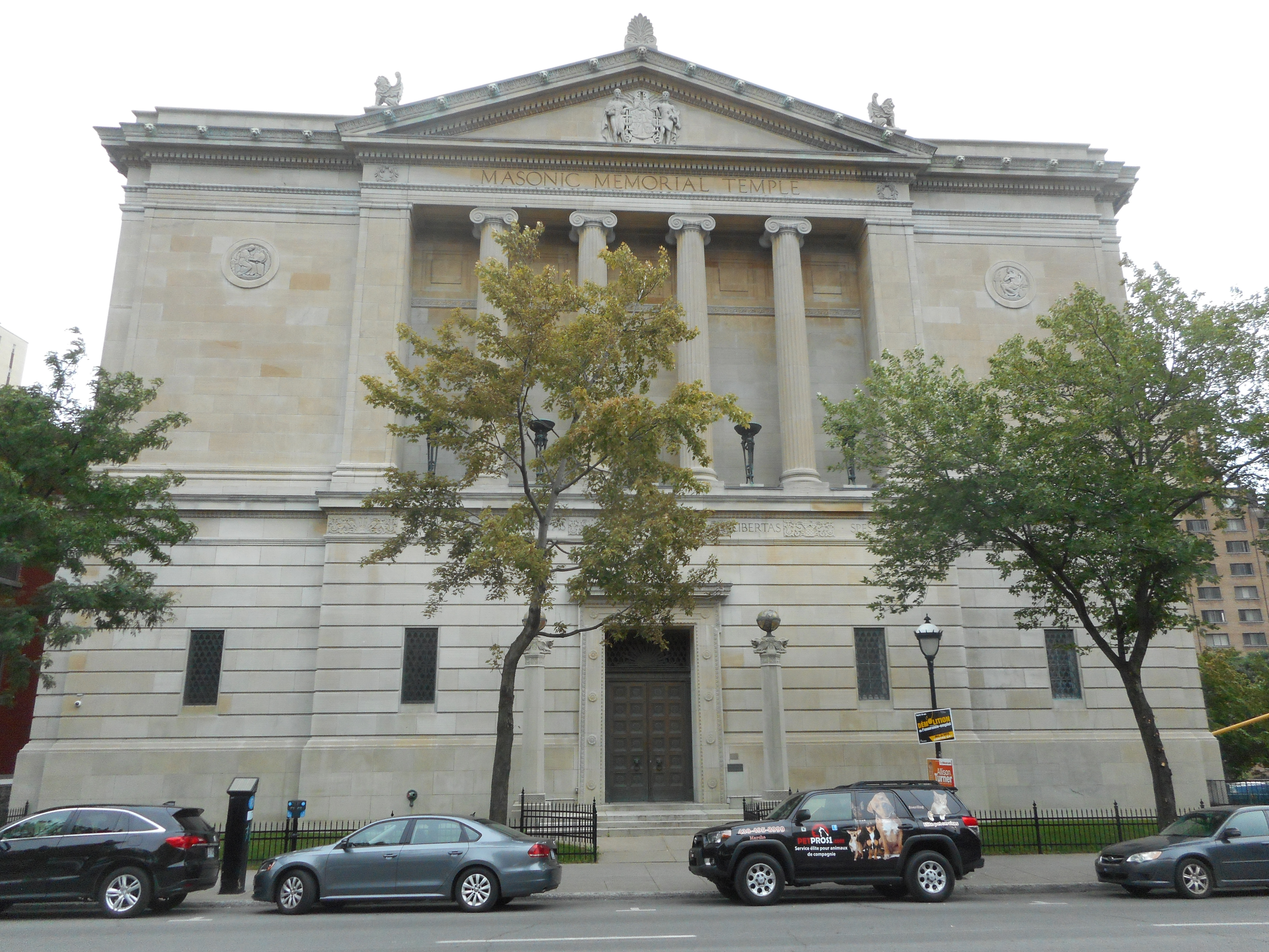 Temple maçonnique de Montréal, 1850 rue Sherbrooke ouest